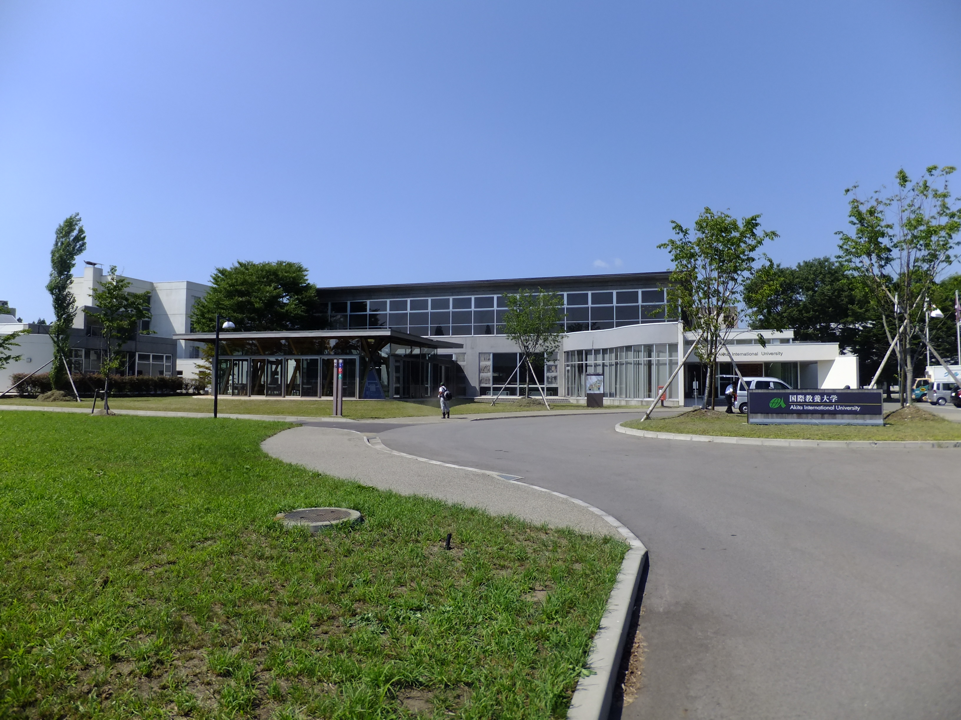 国際教養大学、入口バスロータリーとカフェテリア棟